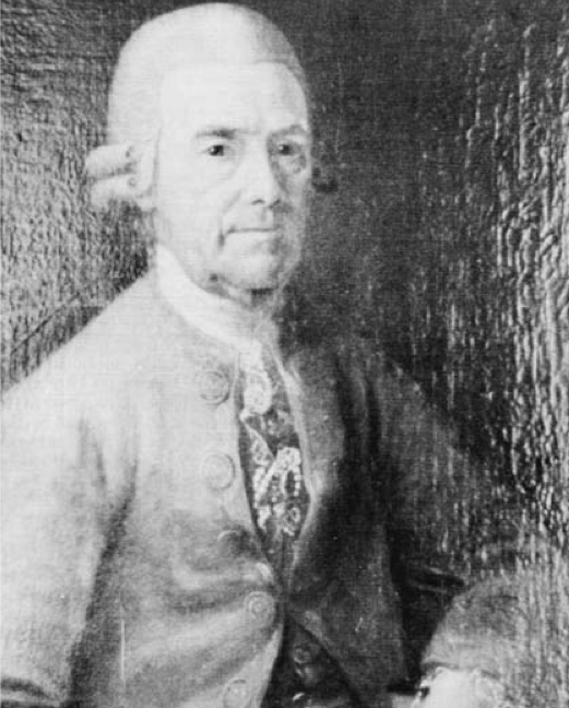 Porträt von Landdrost Wilhelm Heinrich Grote (Amtmann Amt Beers)